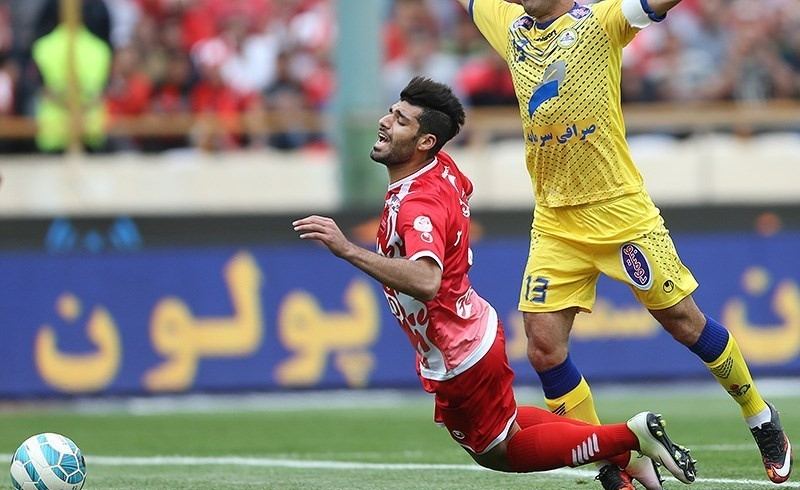 صحنه‌ای از دیدار تیم های فوتبال پرسپولیس و نفت تهران